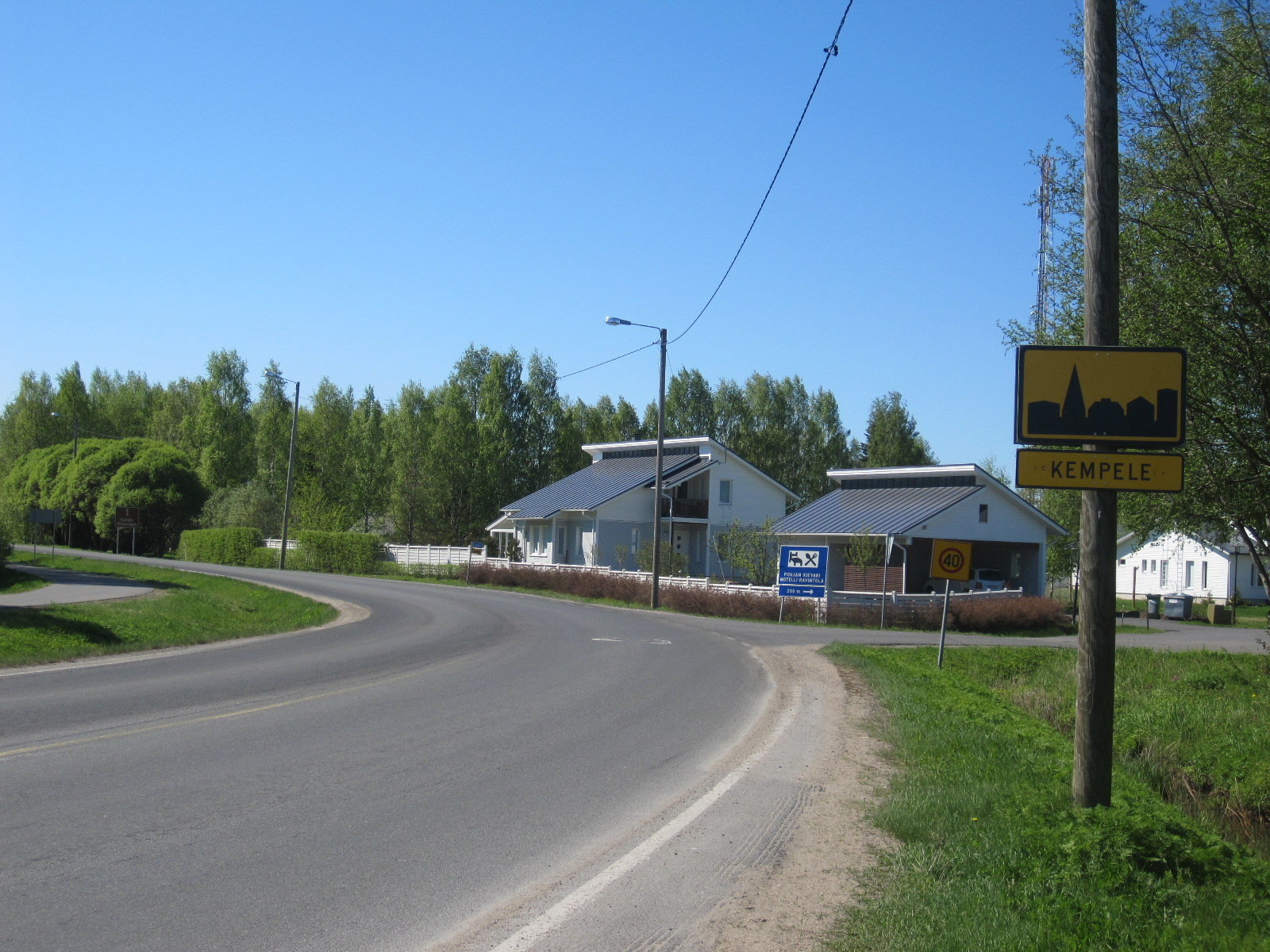 Näkymä yhdystielle 8154 (Piriläntie) seututieltä 847 katsottuna Kempeleen Paiturissa.